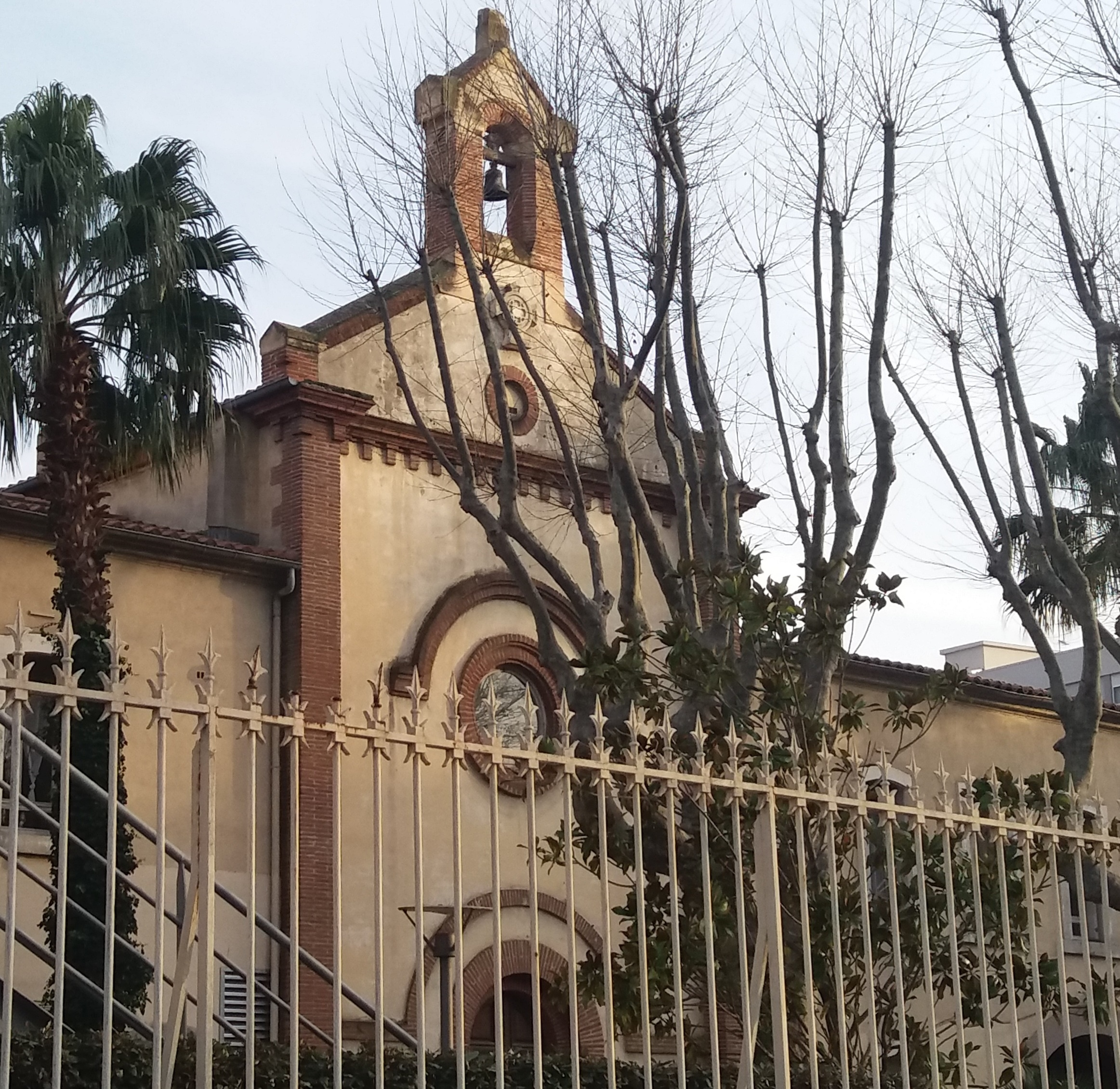 La Mare de Déu de la Misericòrdia de Perpinyà